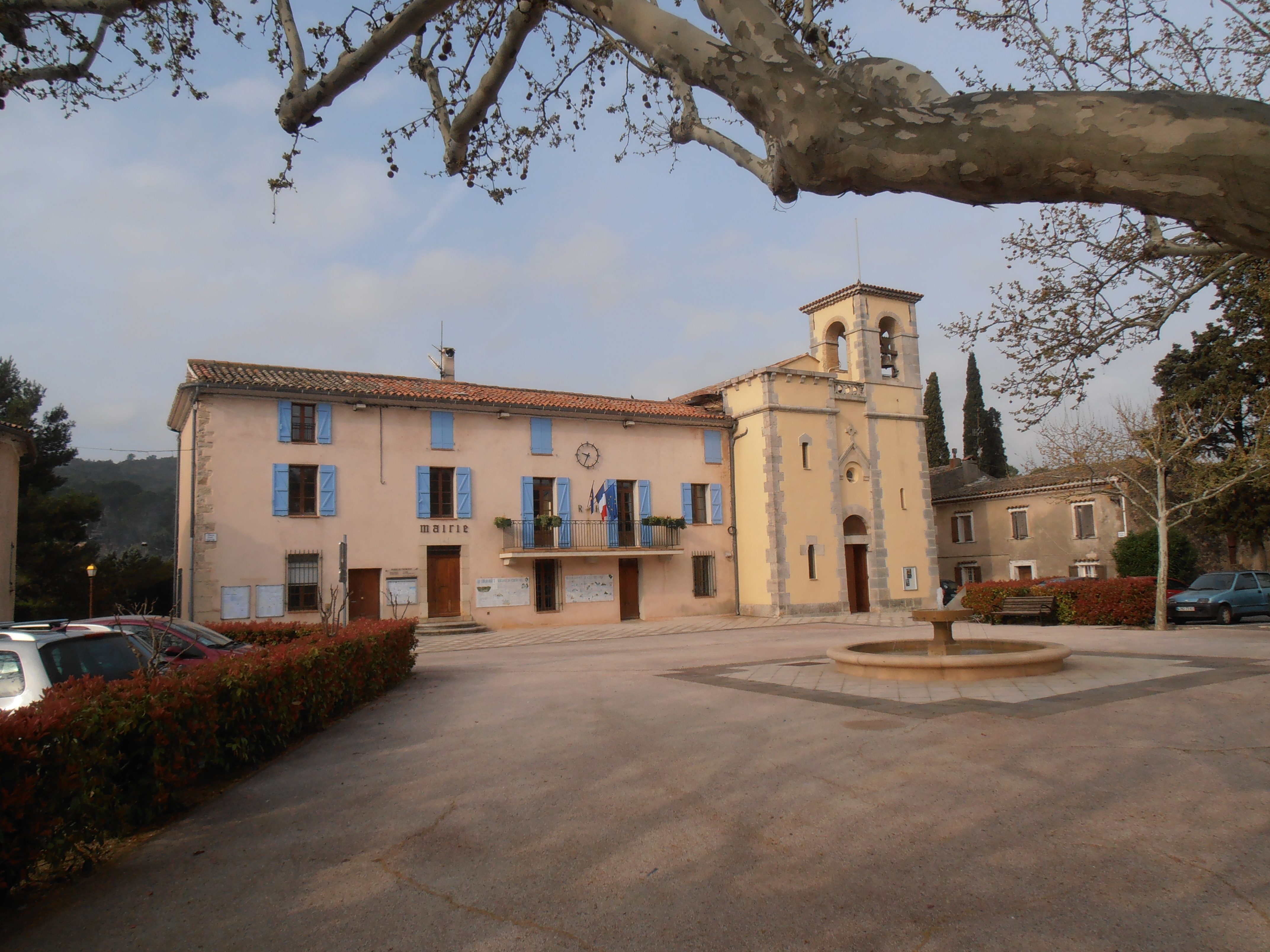 Le Thoronet (Var) La mairie, l'église et la place du village